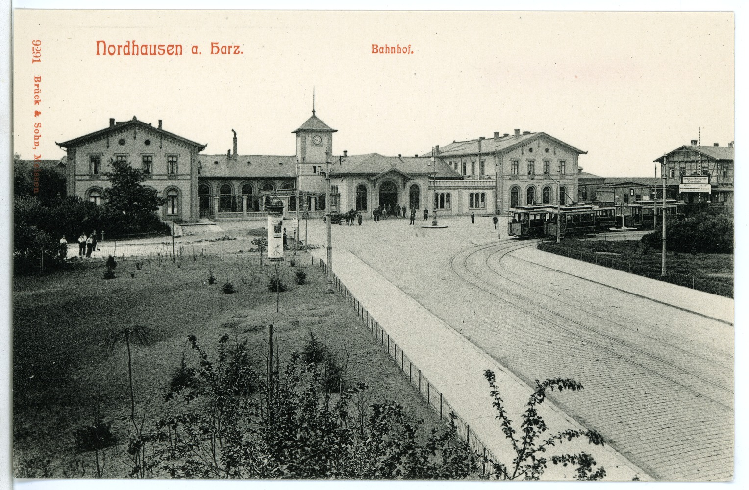 Nordhausen; Bahnhof This postcard is from publisher Brück & Sohn in Meißen ( This postcard has a unique number 09291 and is available in a higher resolution at the publisher. This images was uploaded in a cooperation project between Wikipedians and the publisher.